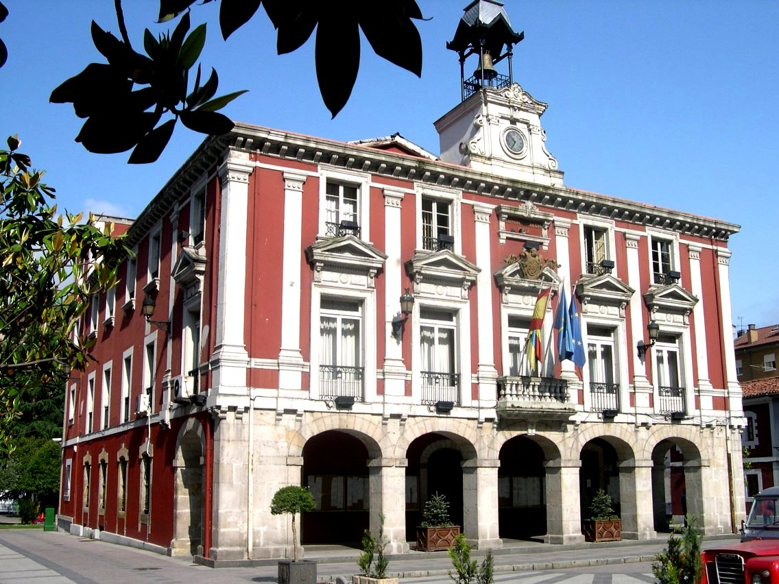 Casa'l conceyu de Mieres, Asturies